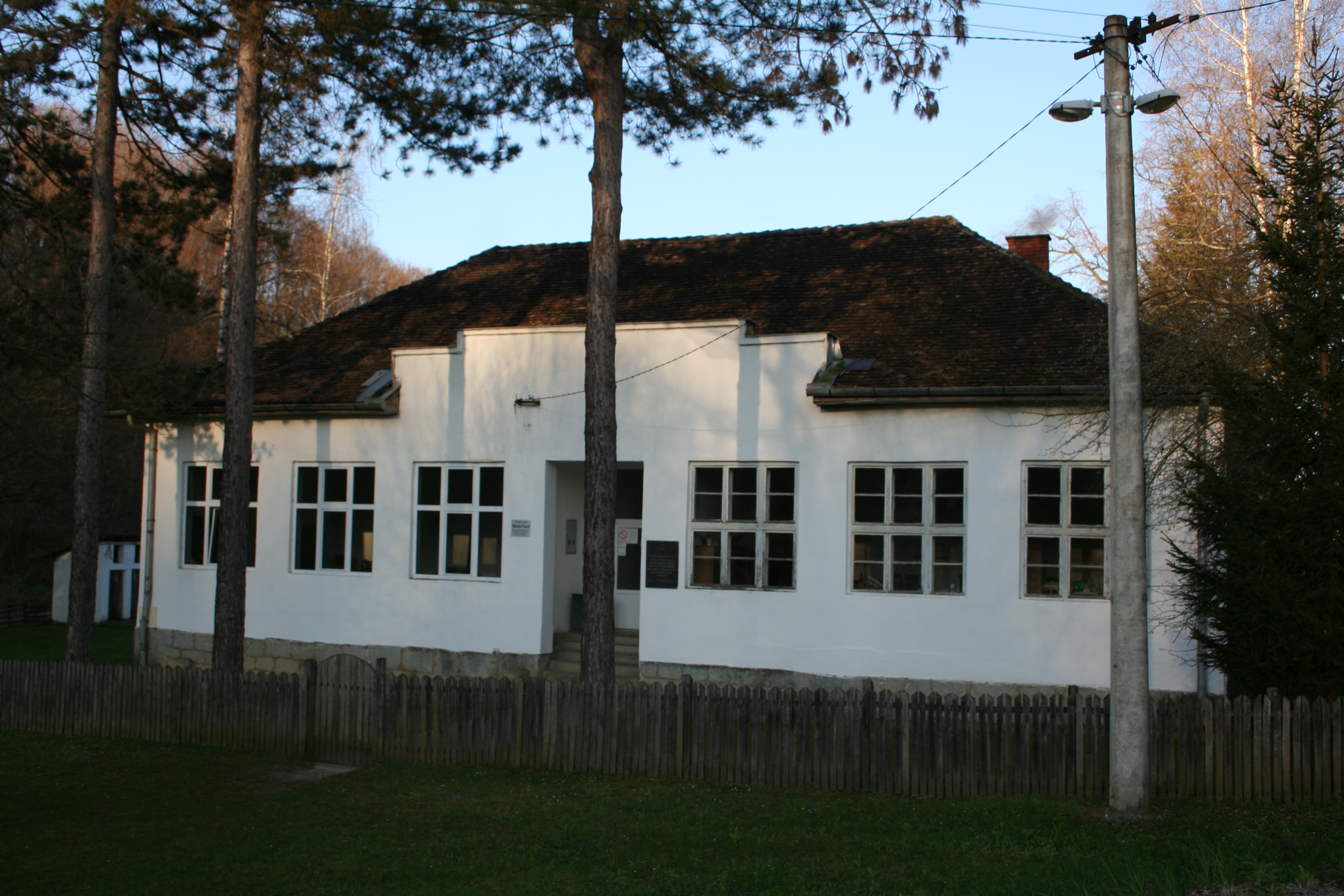 Škola i centar sela, Miličinica